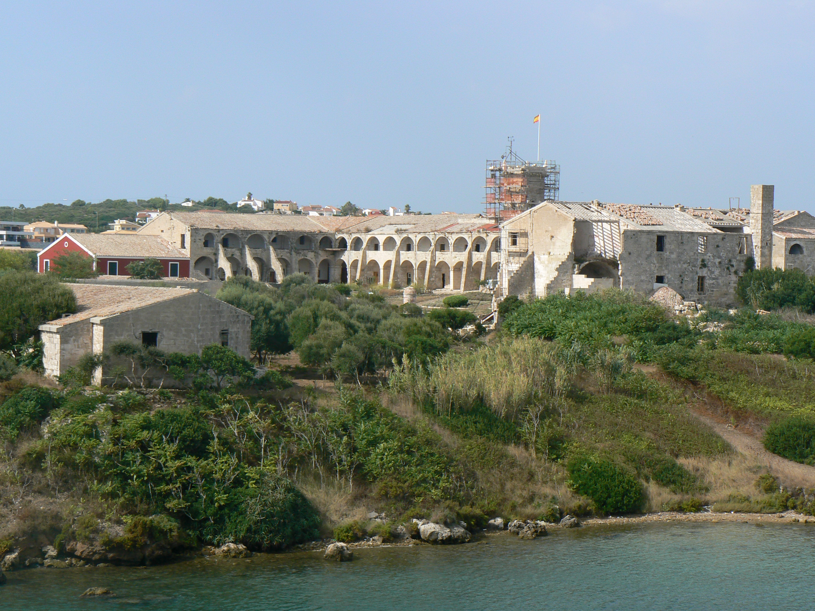 Reconstrucció de l'antic hospital anglès a l'illa del Rei, situada al port natural de Maó.